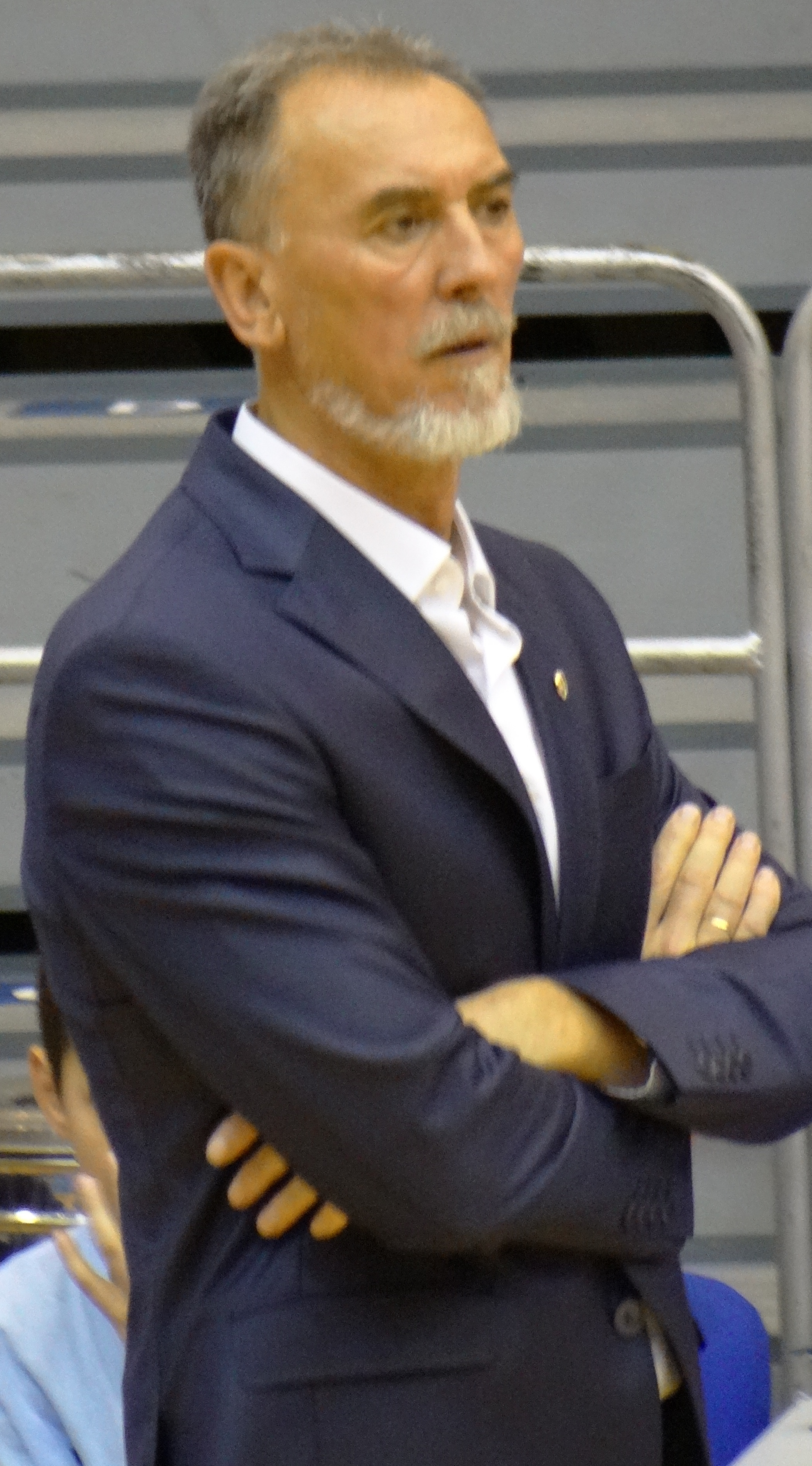 Veljko Basić